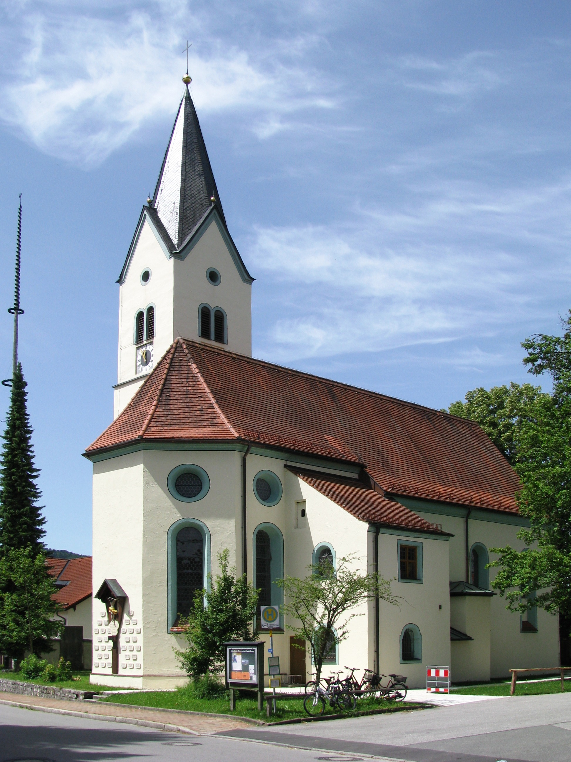 Katholische Pfarrkirche St. Georg, Neubau 1698/99, Turmoberteil 1754. This is a photograph of an architectural monument.